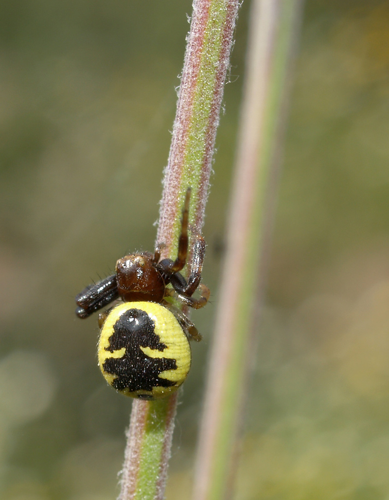 Synema globosum (Thomisidae). Losar de la Vera, Cáceres.